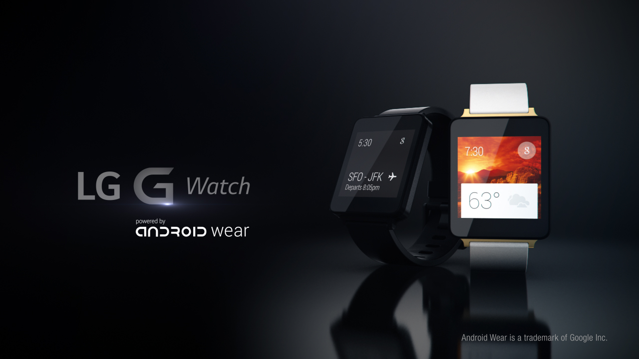 LG G Watch